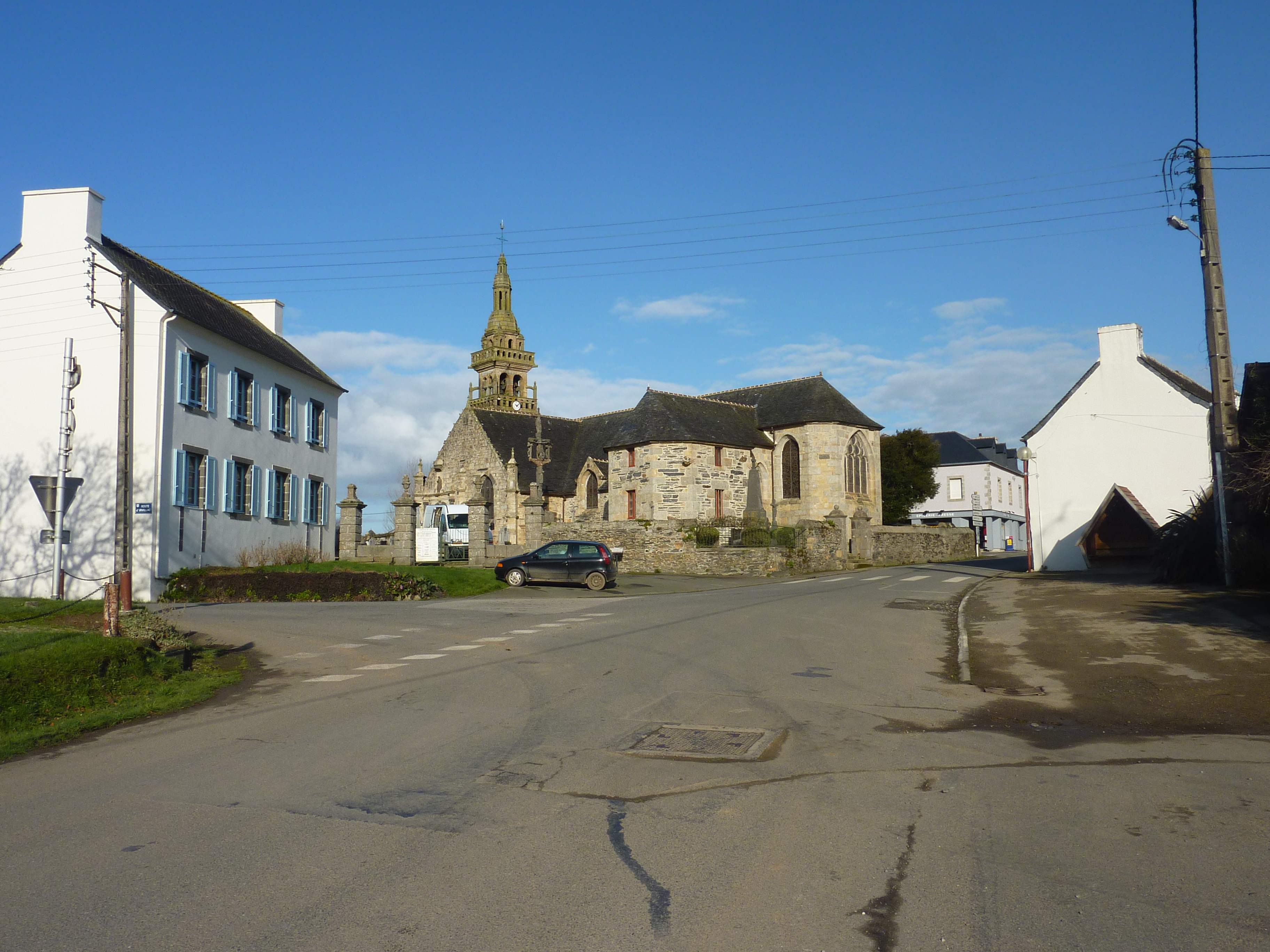 Le Tréhou : la rue principale du village et l'église paroissiale